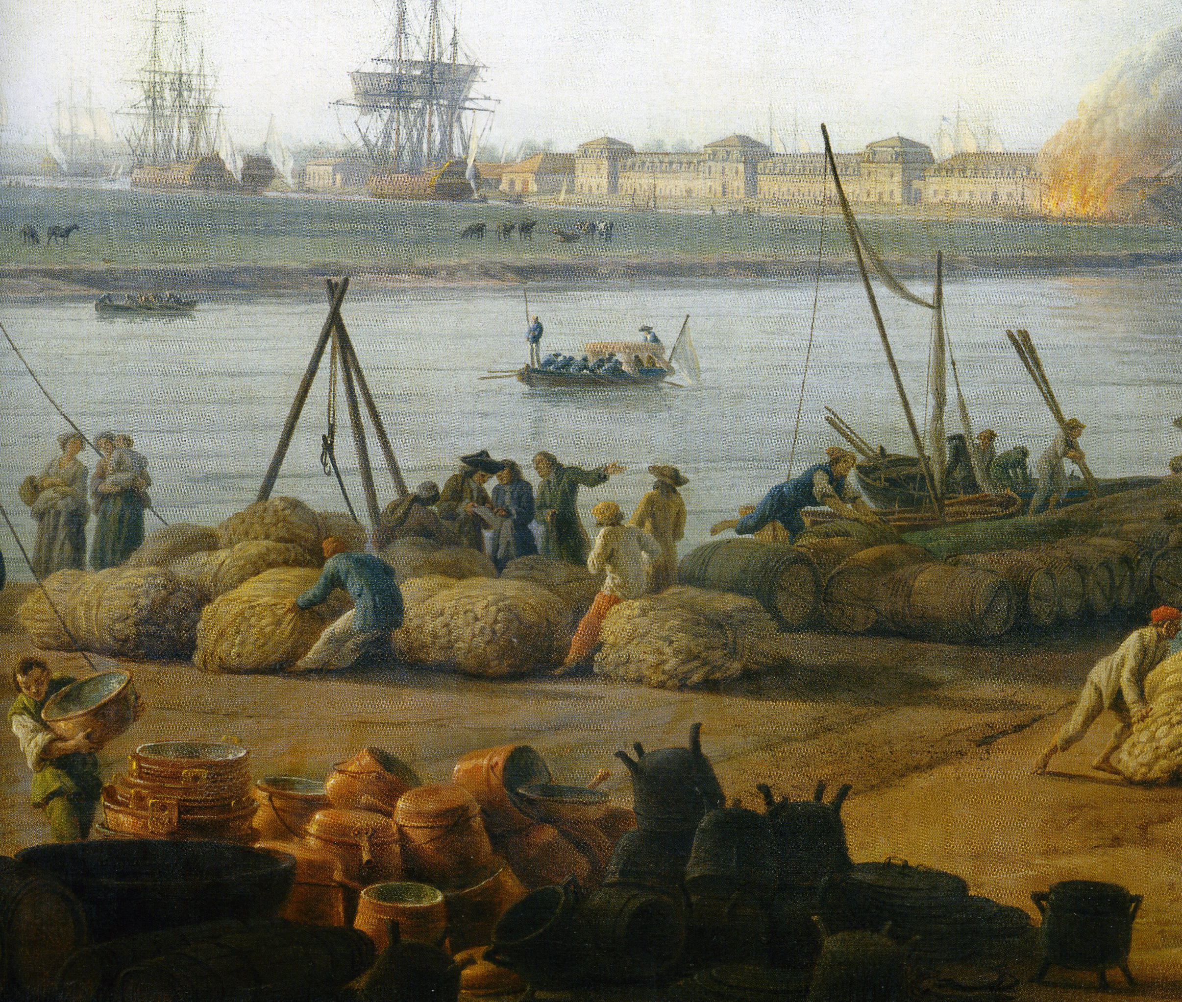 Vue du port de Rochefort prise du magasin des colonies en 1761. Détail du peinture de Joseph Vernet